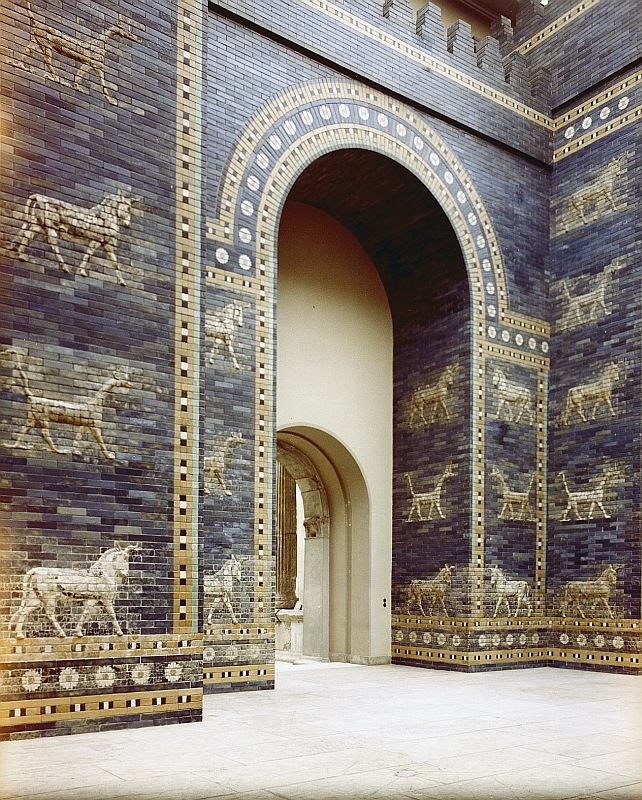 Original image description from the Deutsche Fotothek Berlin. Pergamonmuseum, Ischtar-Tor